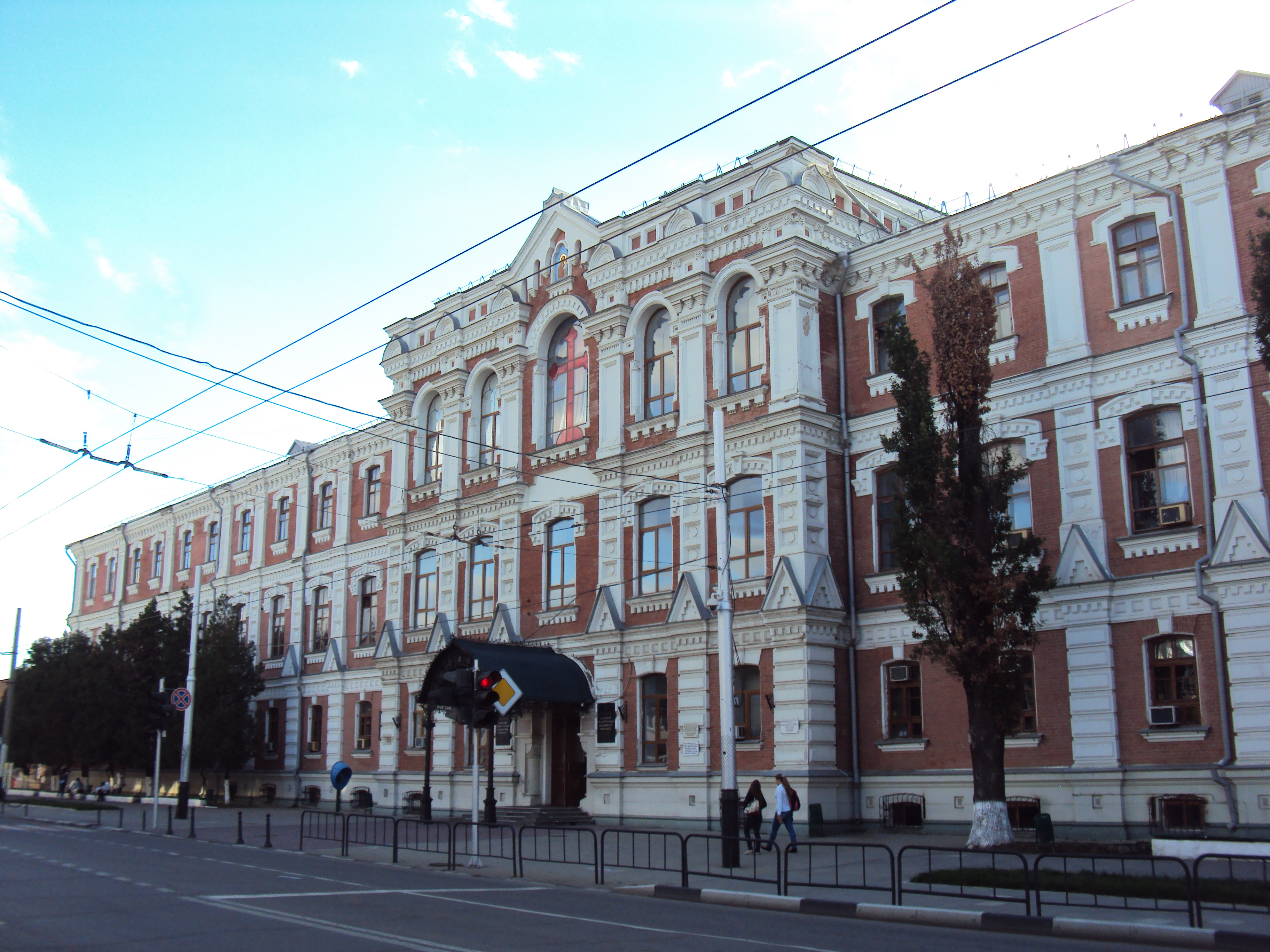 Здание епархиального училища (Краснодарский край, Краснодар, им. седина улица, 4)